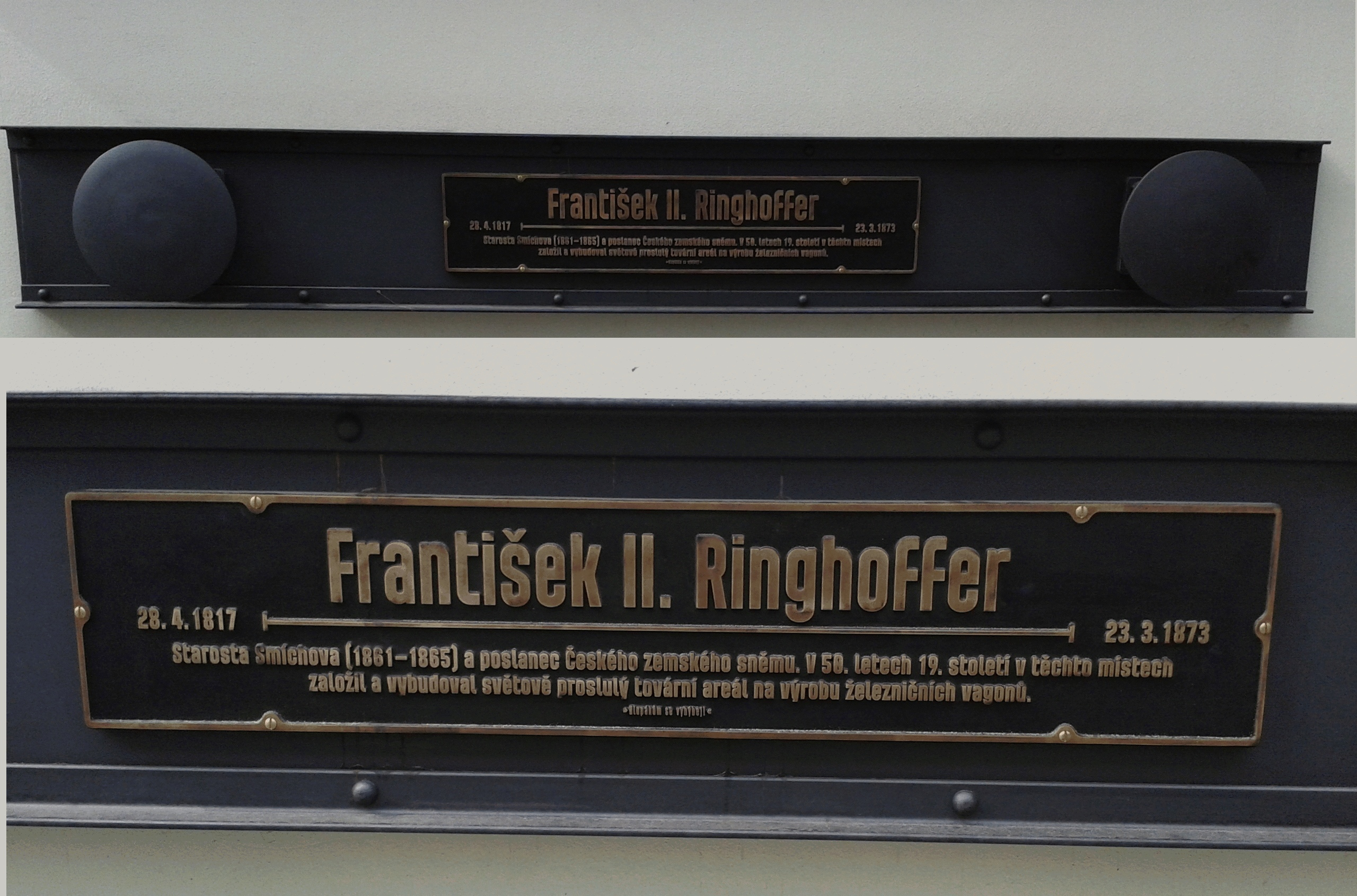 V pátek 27. dubna 2018 v 11.00 hodin byla slavnostně odhalena pamětní deska barona Františka II. Ringhoffera na adrese Plzeňská 233/10 (na budově obchodního centra Nový Smíchov, přesněji na hlavní budově bývalé továrny na železniční vagony). Pamětní deska je z dílny Jakuba Grece. Desku slavnostně odhalil starosta Prahy 5 Pavel Richter (TOP 09) a jeho zástupce Lukáš Herold (ODS). V horní části fotografie je celkový pohled na pamětní desku, v dolní části fotografie je pak detail vlastního textu na pamětní desce. Text: František II. Ringhoffer 28.04.1817 - 23.03.1873 Starosta Smíchova (1861-1865) a poslanec Českého zemského sněmu. V 50. letech 19. století v těchto místech založil a vybudoval světově proslulý tovární areál na výrobu železničních vagonů.